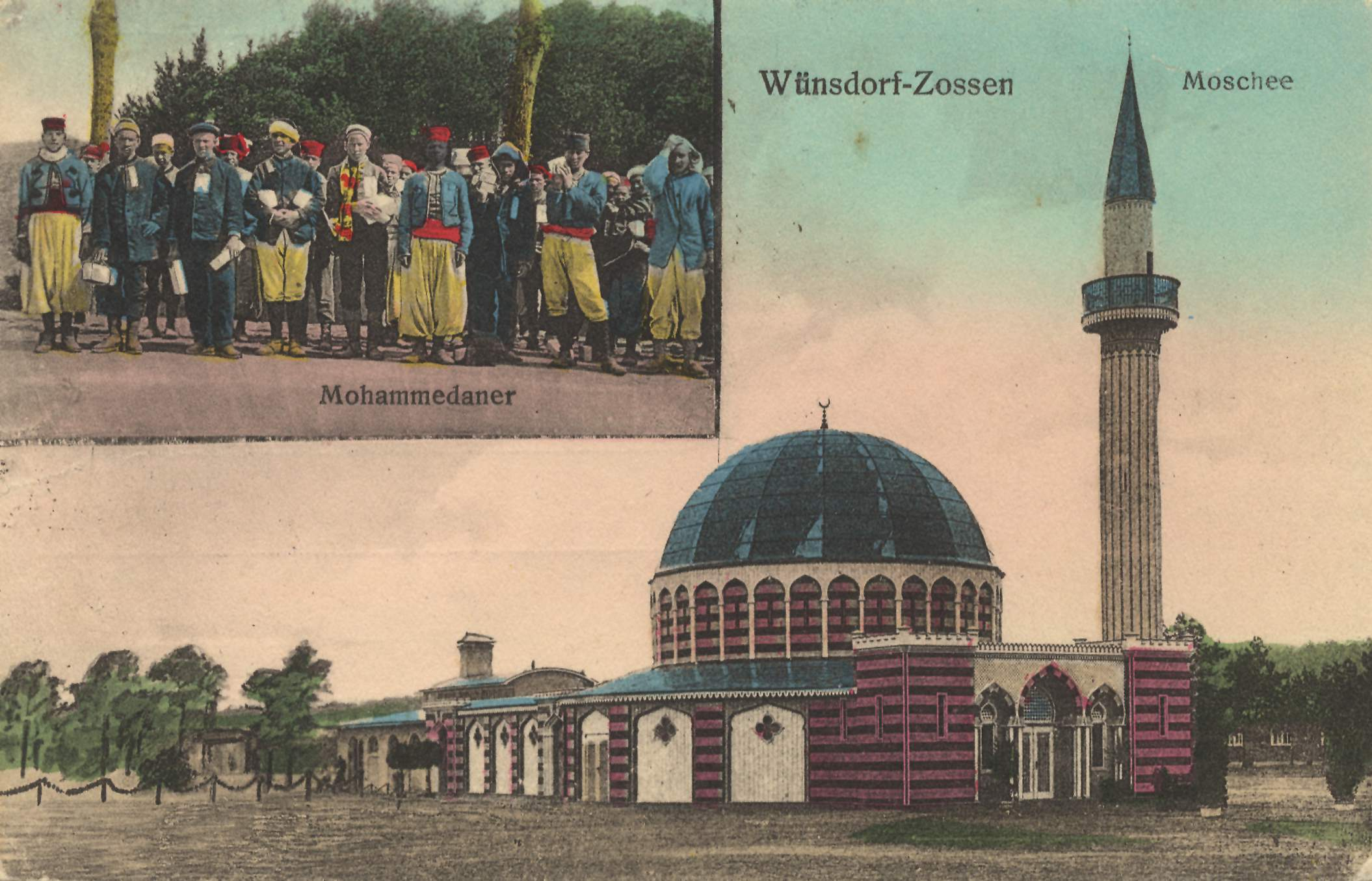 Holzmoschee im Halbmondlager bei Wünsdorf, Kriegsgefangenenlager des Ersten Weltkriegs